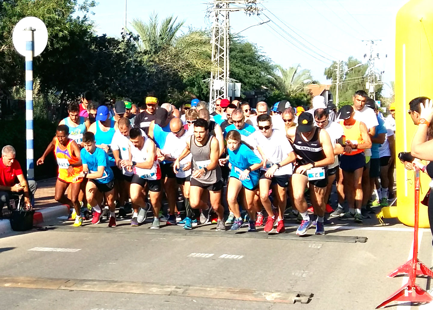 מרוץ להבים 2018 - הזינוק למקצה 10 ק"מ